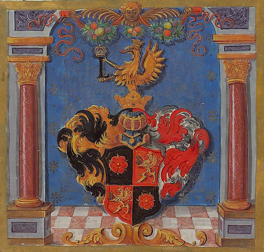 Wappen Sebastian von Rostock, aus dem Adlesbrief Kaiser Leopolds I. vom 14. März 1668, UB Freiburg, Hs. 1453